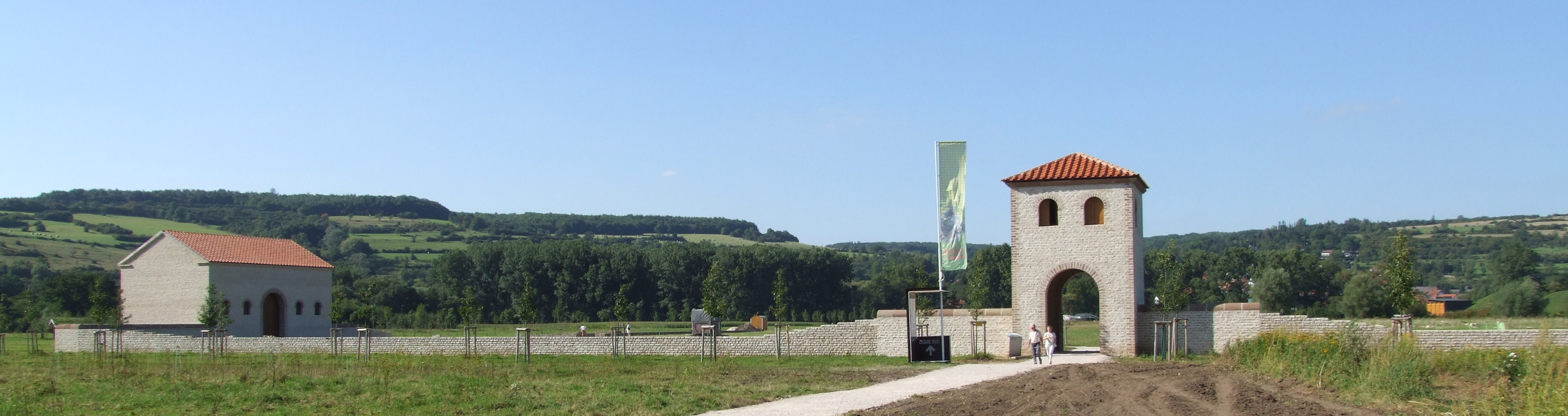 Rekonstruktion des Eingangs zur römischen Villa Reinheim; Europäischer Kulturpark Bliesbruck-Reinheim